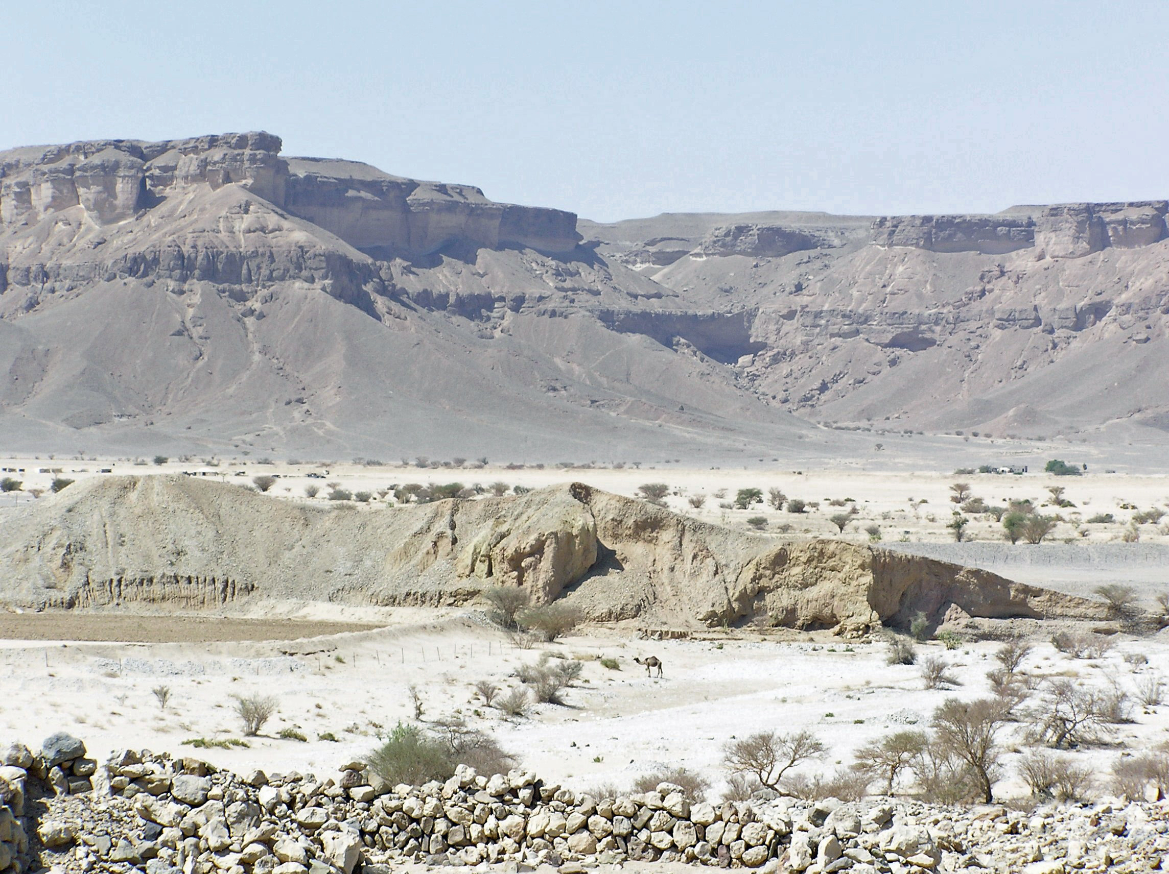 Yémen - Système d'irrigation en lisière de Shabwah